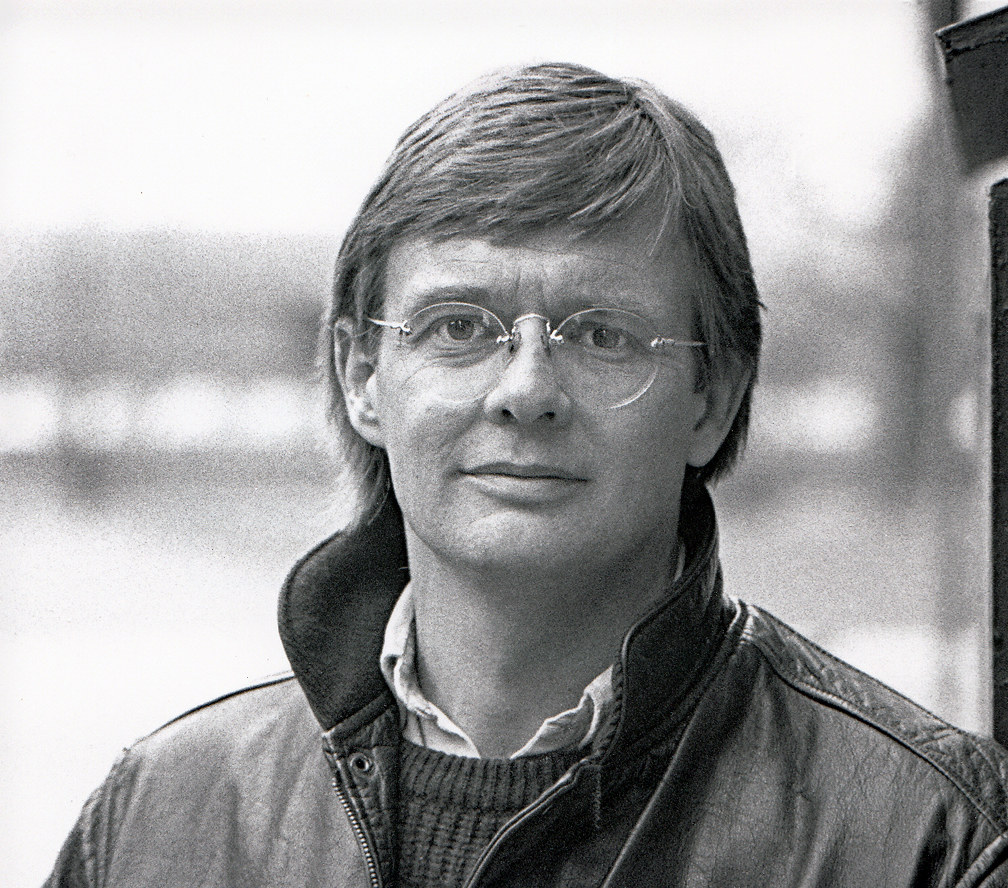 Bille August. Malmö 1988.